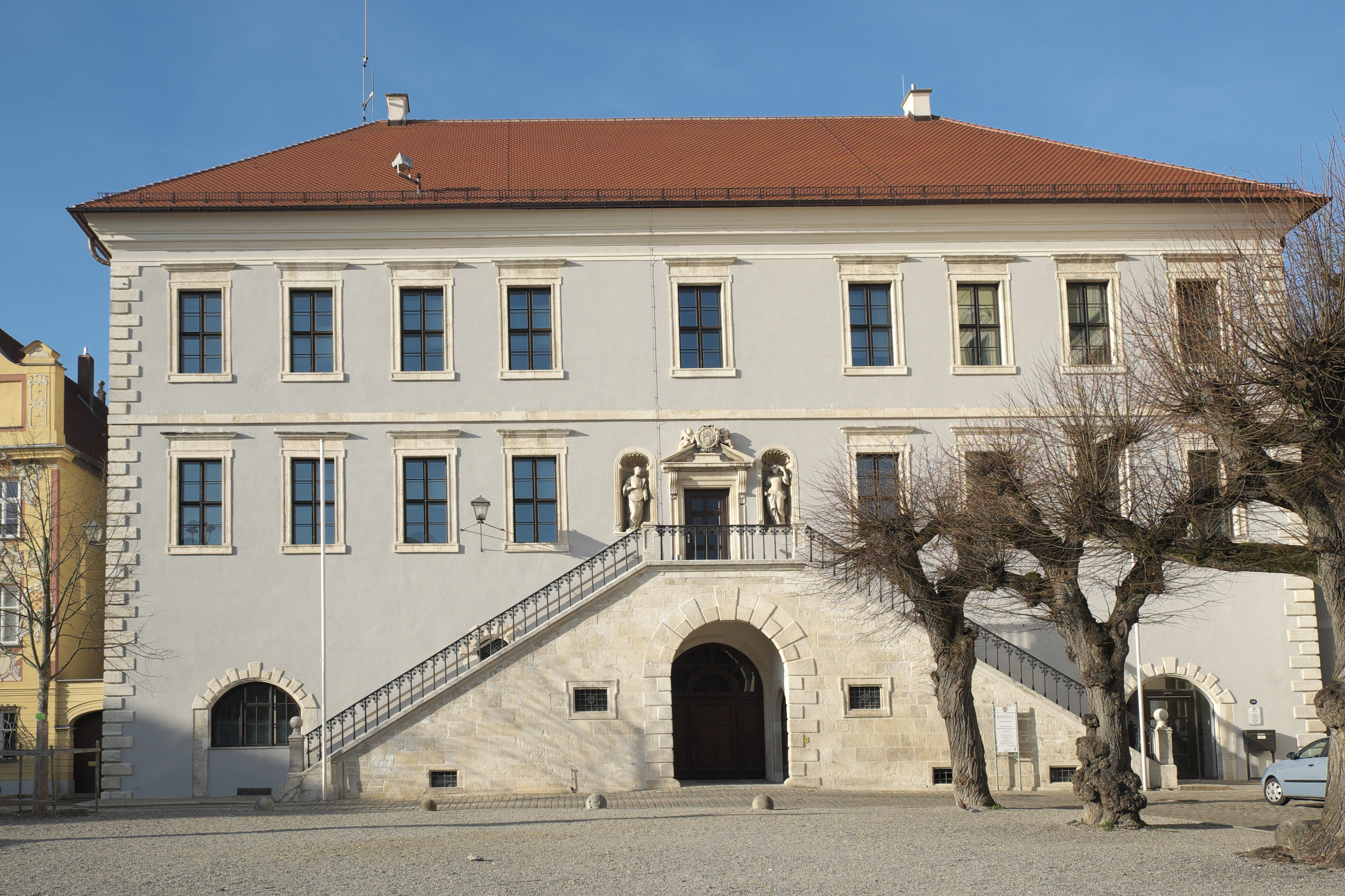 Rathaus in Neuburg an der Donau im Landkreis Neuburg-Schrobenhausen (Oberbayern/Bayern)